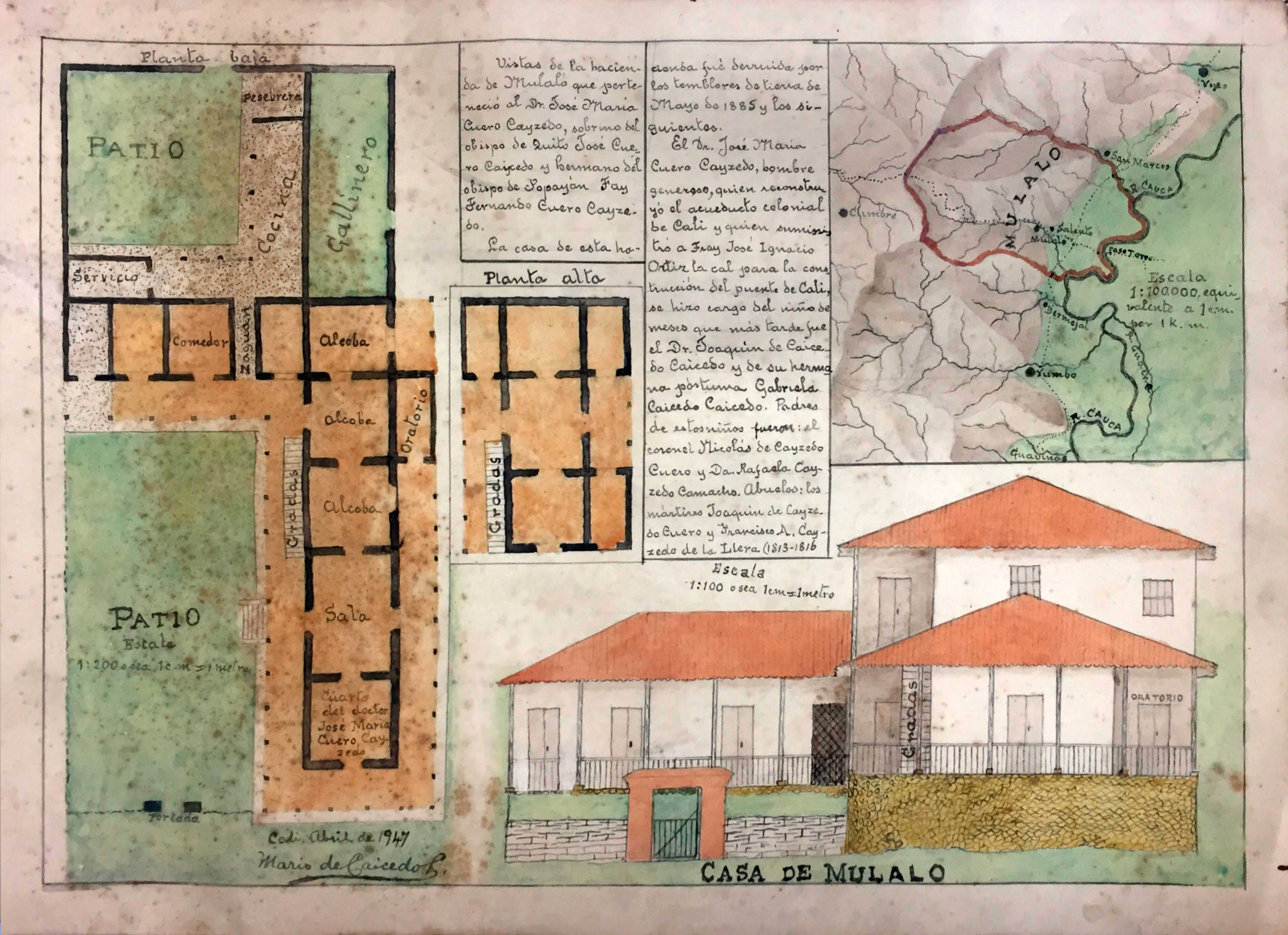 CASA DE MULALO Vistas de la hacienda de Mulaló, que perteneció al Dr. José María Cuero Cayzedo, sobrino del obispo de Quito, José Cuero Caycedo, y hermano del obispo de Popayán, Fray Fernando Cuero Cayzedo. La casa de esta hacienda fue derribada por los temblores de tierra de Mayo de 1885 y los siguientes. El Dr. José María Cuero Cayzedo, hombre generoso, quien reconstruyó el acueducto colonial de Cali y quien suministró a Fray José Ignacio Ortiz la cal para la construcción del puente de Cali, se hizo cargo del niño de meses que más tarde fue el Dr. Joaquín de Caicedo Caicedo y de su hermana póstuma, Gabriela Caicedo Caicedo. Padres de estos niños fueron el coronel Nicolás de Caycedo Cuero, y doña Rafaela Cayzedo Camacho. Abuelos: los mártires Joaquín de Cayzedo Cuero y Francisco A. Cayzedo de la Llera. (1813-1816) Escala 1:100, o sea 1 cm = 1 metro Cali, Abril de 1947 Mario de Caicedo L.